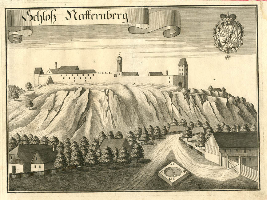 “Schloß Natternberg” (Natternberg, Deggendorf; ehem. Burg der Grafen von Bogen), aus : Beschreibung des Churfürsten- und Hertzogthumbs Ober- und Nidern Bayrn. Rentamt Landshut, Gericht Vilshofen, 1723